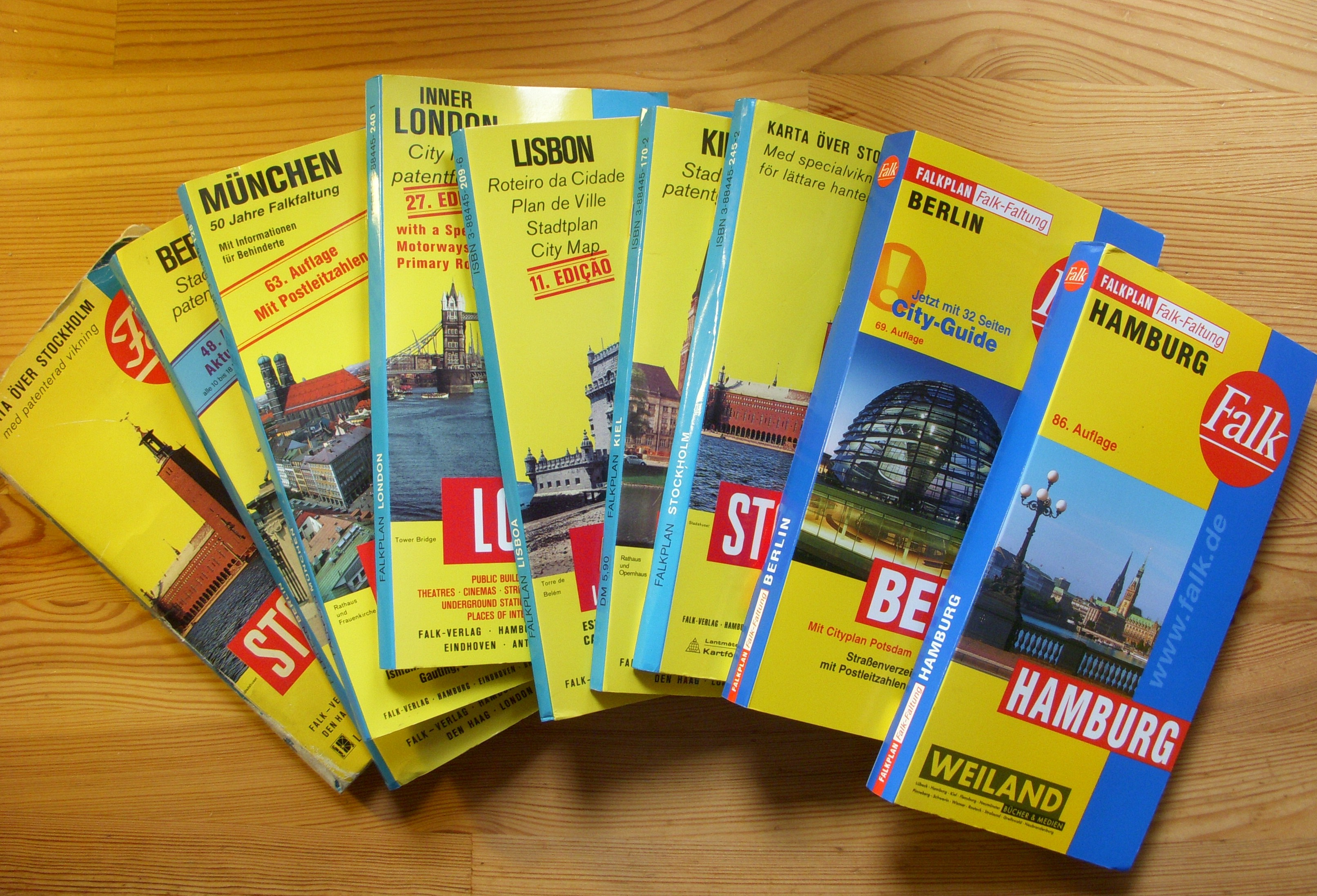 Einige "Falk-Pläne"